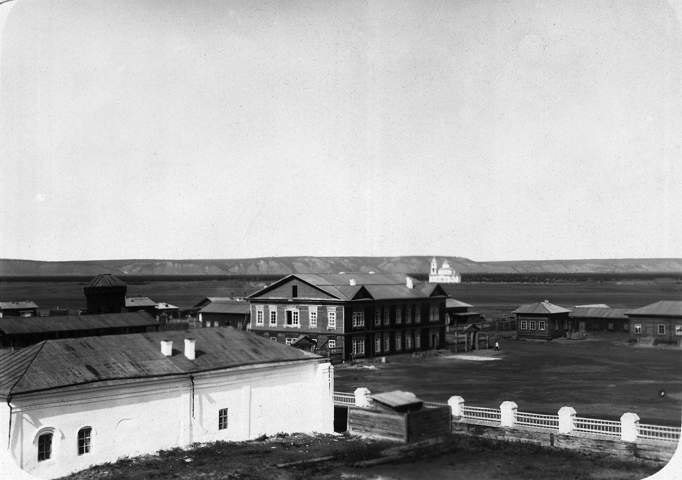 Якутск. Областное правление и казачество.